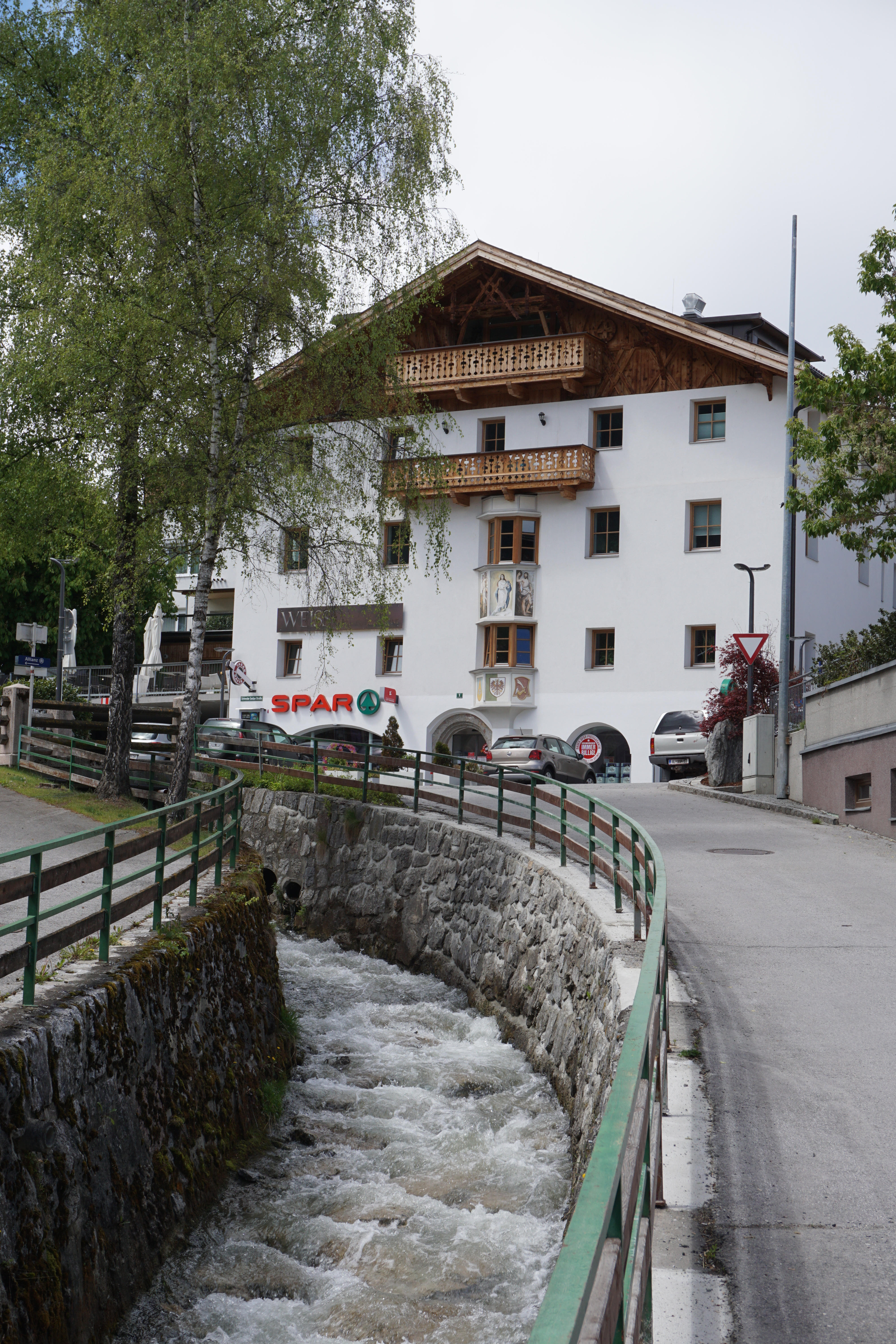 Axamer Bach unterhalb des Axamer Dorfplatzes This media shows the remarkable cultural object in the Austrian state of Tyrol listed by the Tyrolean Art Cadastre with the ID 28804. (on tirisMaps, pdf, more images on Commons, Wikidata)